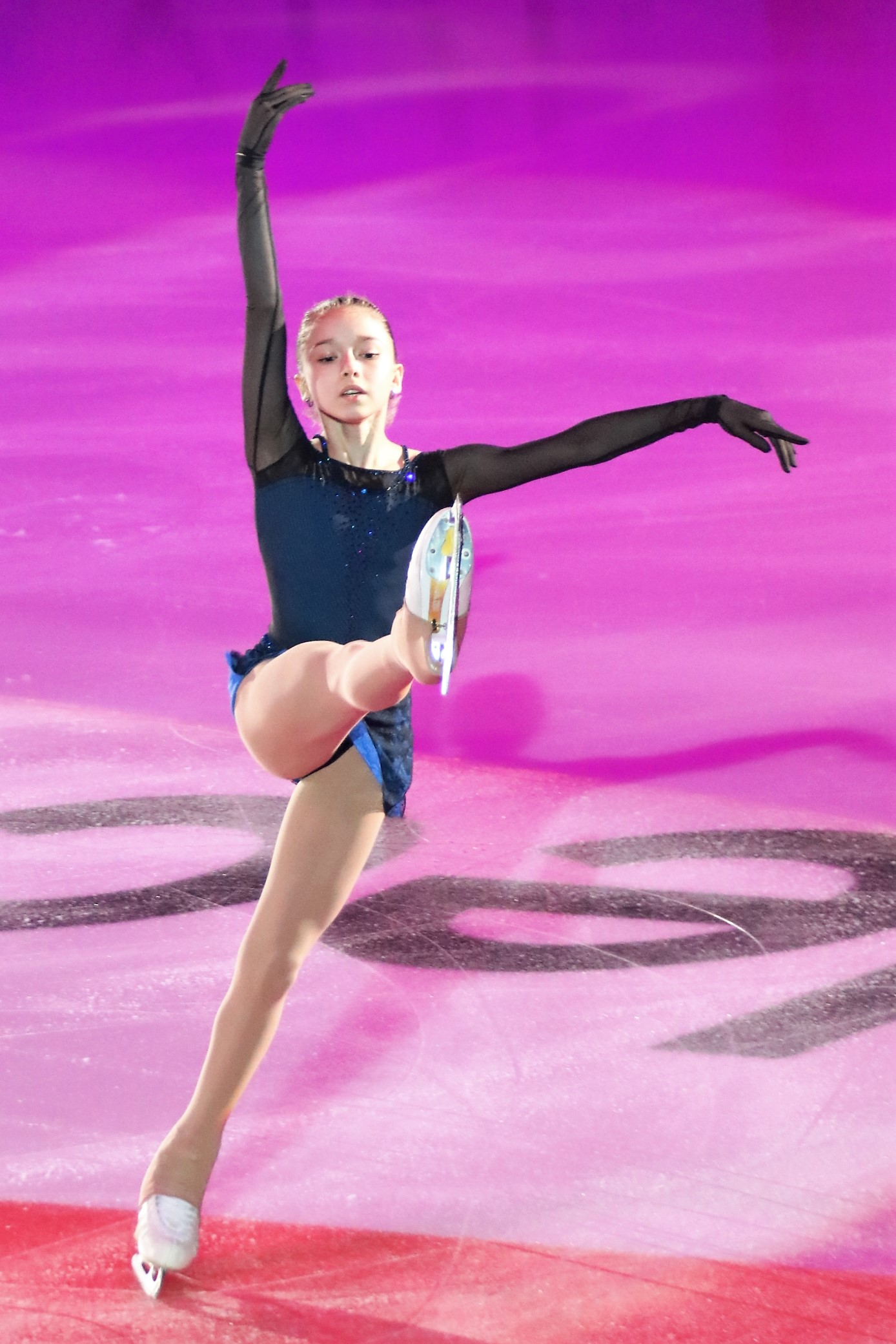 Камила Валиева на показательных выступлениях Rostelecom Cup 2018